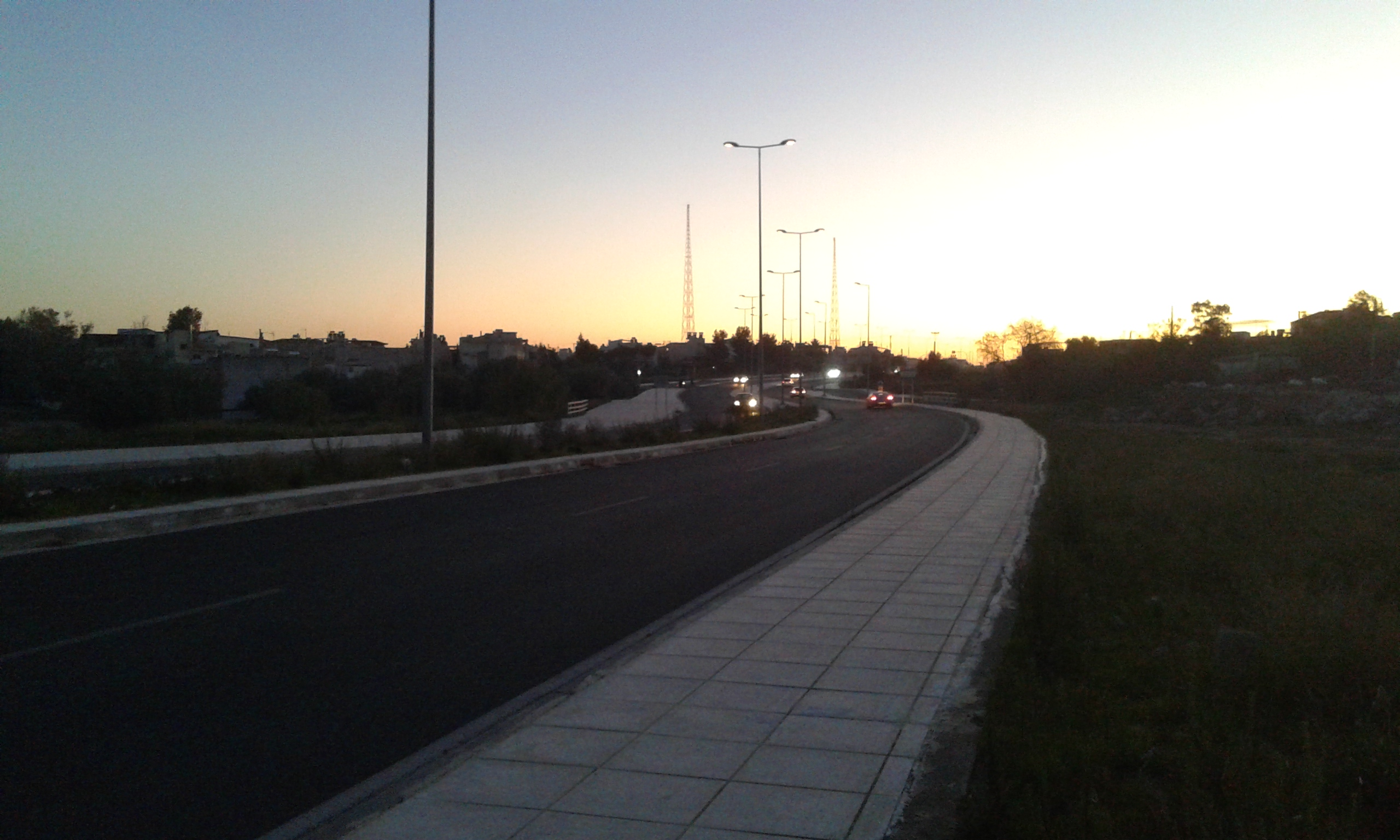 Η Λεωφόρος Θηβών στις περιοχές Ίλιον και Καματερό.